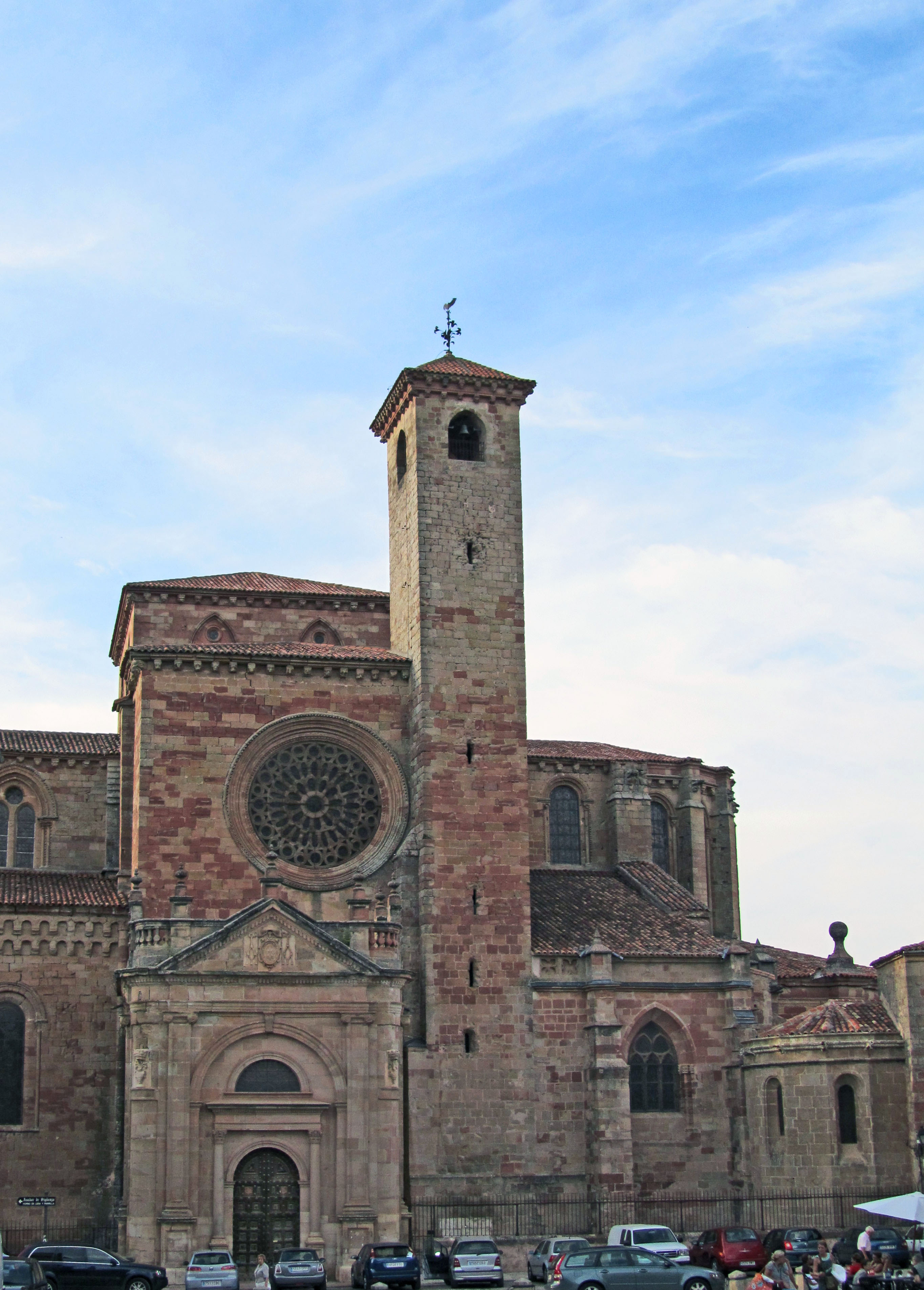 Puerta del Mercado y torre del gallo de la catedral de SigÚenza.Spain